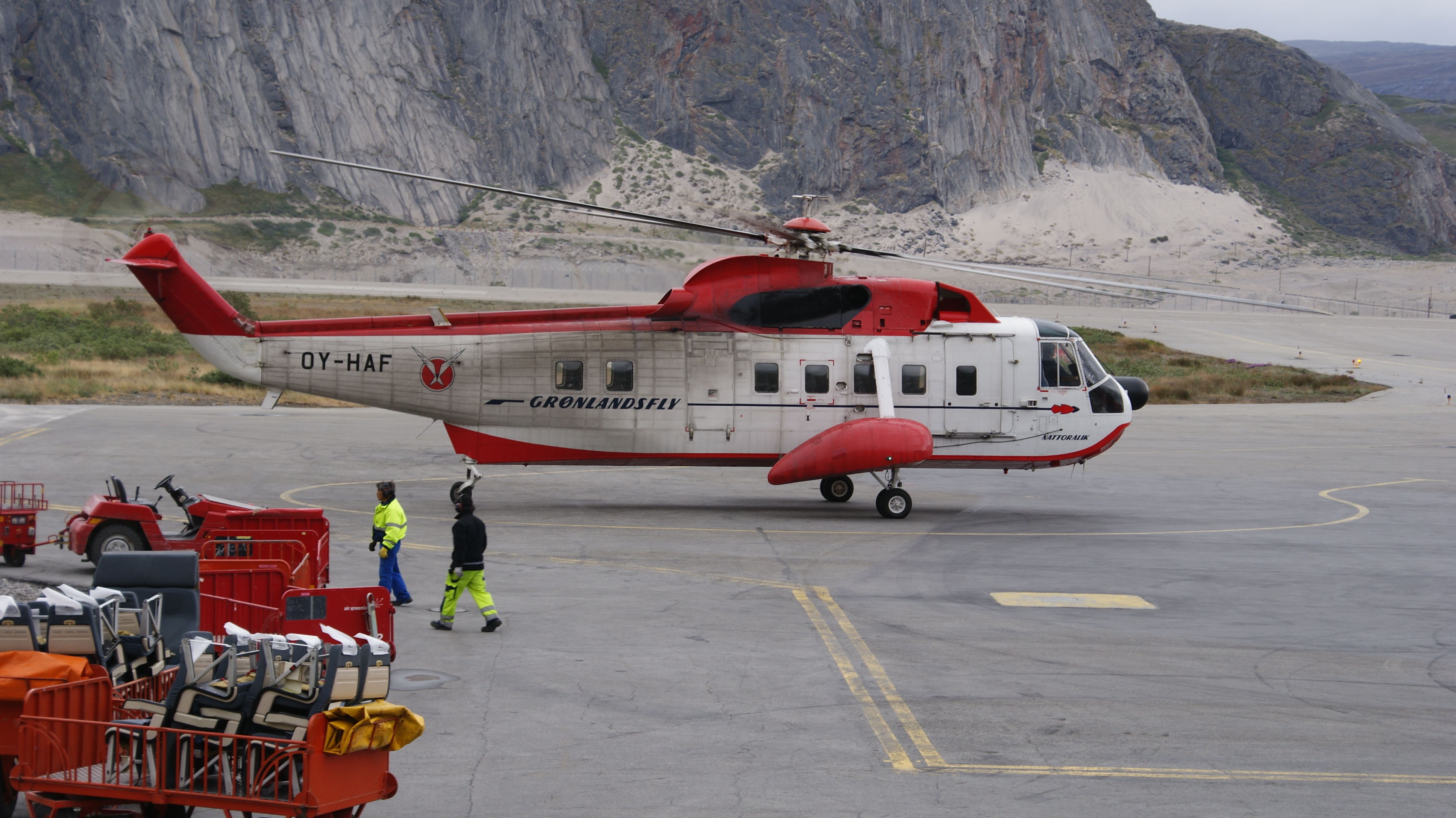 Air Greenland Sikorsky S-61N at Kangerlussuaq Airport, Greenland.